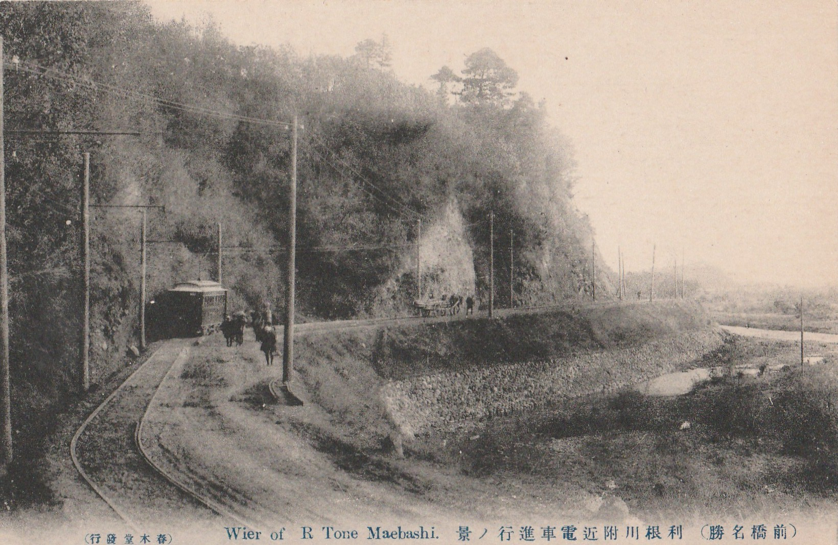 詳細不明、前橋電気軌道（伊香保軌道線前橋線）だと思われる。